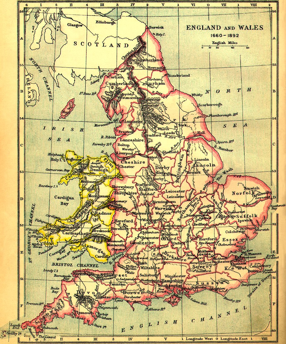 Map Cymru a Lloegr (ers 1536)